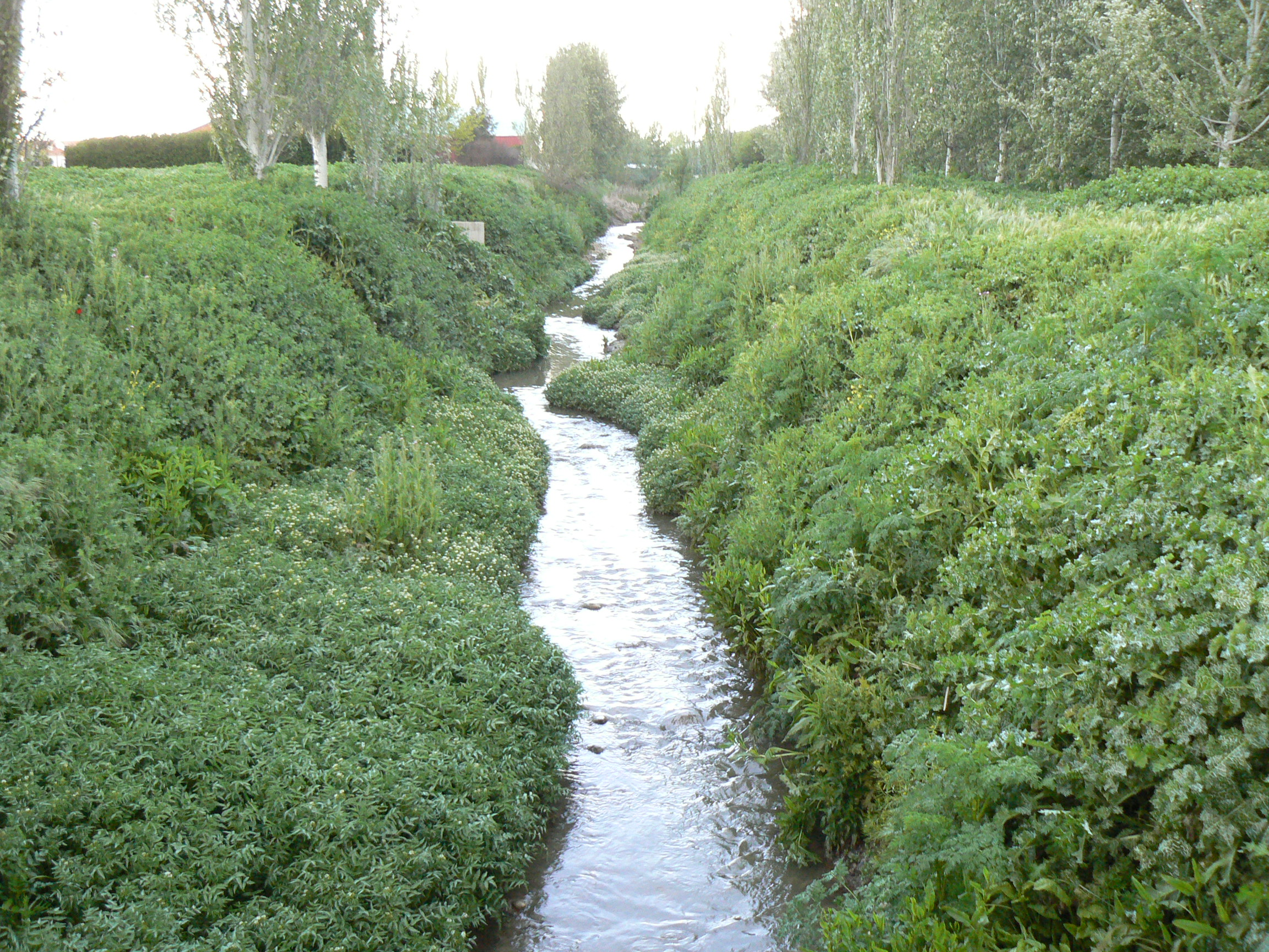 Arroyo Camarmilla. Camarma de Esteruelas, Madrid, España.